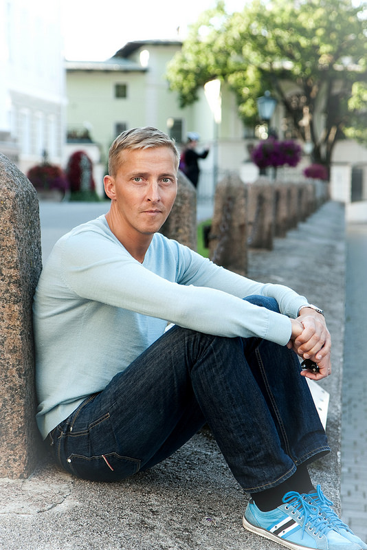 Näitleja Aarne Soro 2012. aastal Tartus, Ülikooli ja Küütri tänava nurgal.